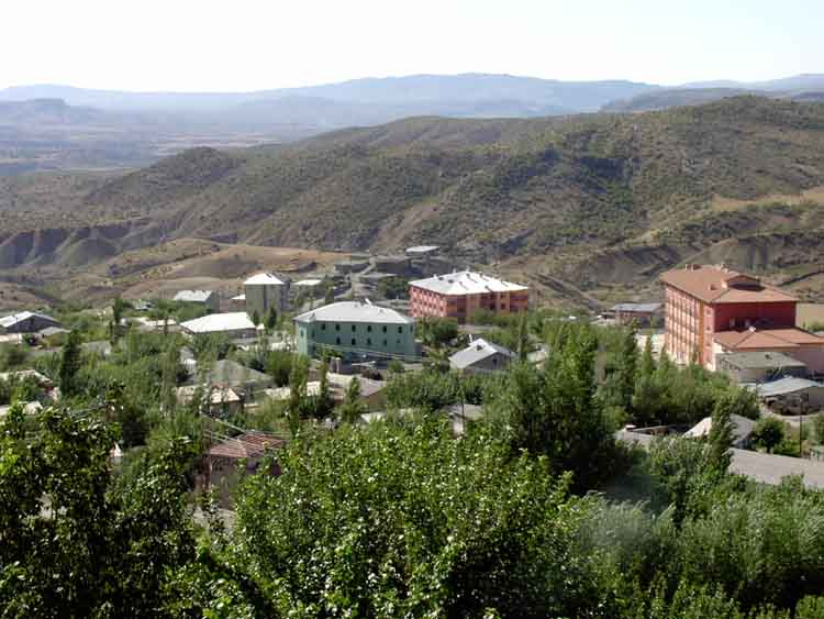 Pasur